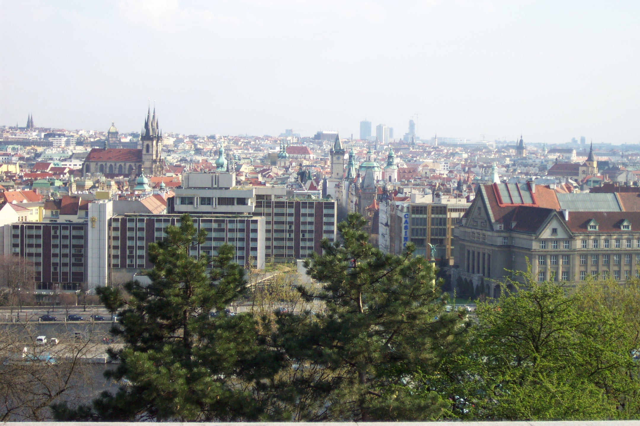 Prague - a Wiev of Josefov from Letná - Praha, pohled na Josefov z Letné